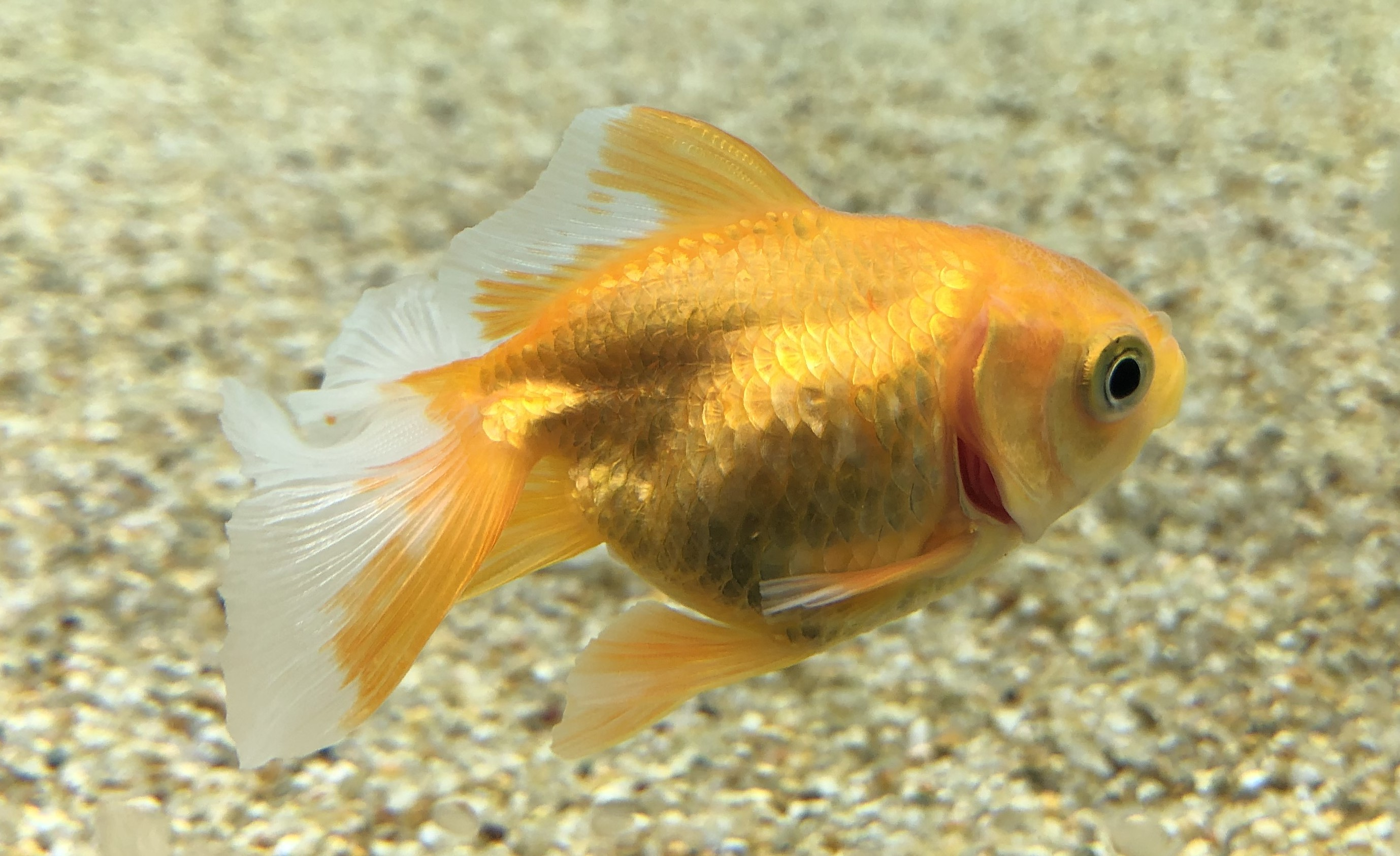 四国水族館のja:トサキン